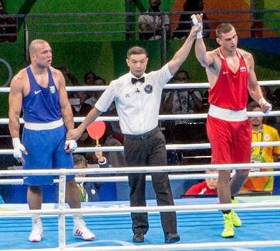 Победа Евгения Тищенко на бразильцем Ногуэйра в 1/8 финала на Летней Олимпиаде 2016 в Рио-де-Жанейро